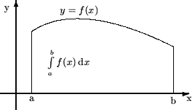 Ábra a Riemann-integrál magyarázatához